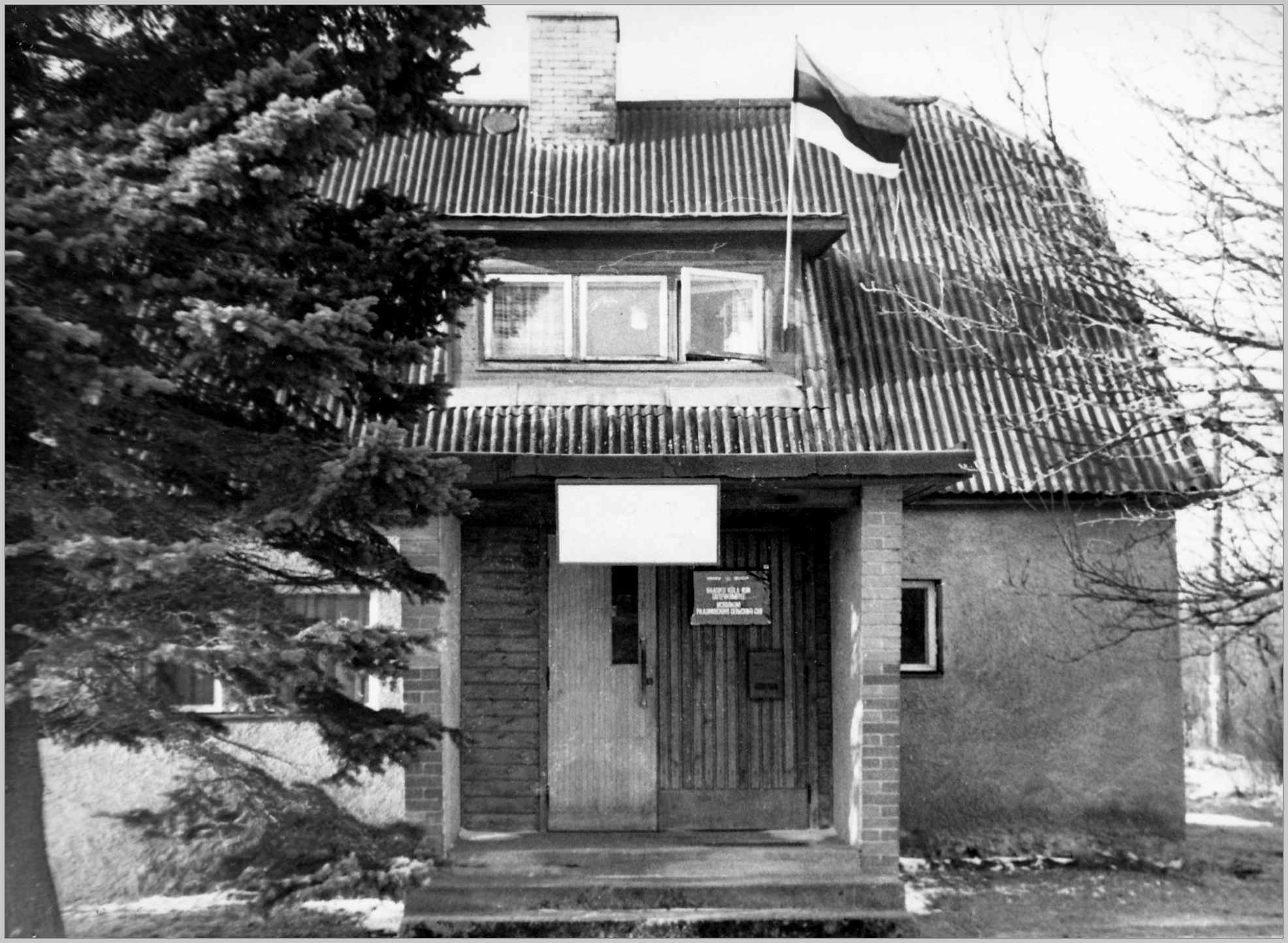 Raasiku külanõukogu hoone Raasiku alevikus Kolhoosi (praegusel Vahtra) tänaval. Foto tehtud ilmselt ajavahemikus 1989-1992, sest majal lehvib sinimustvalge rahvuslipp.